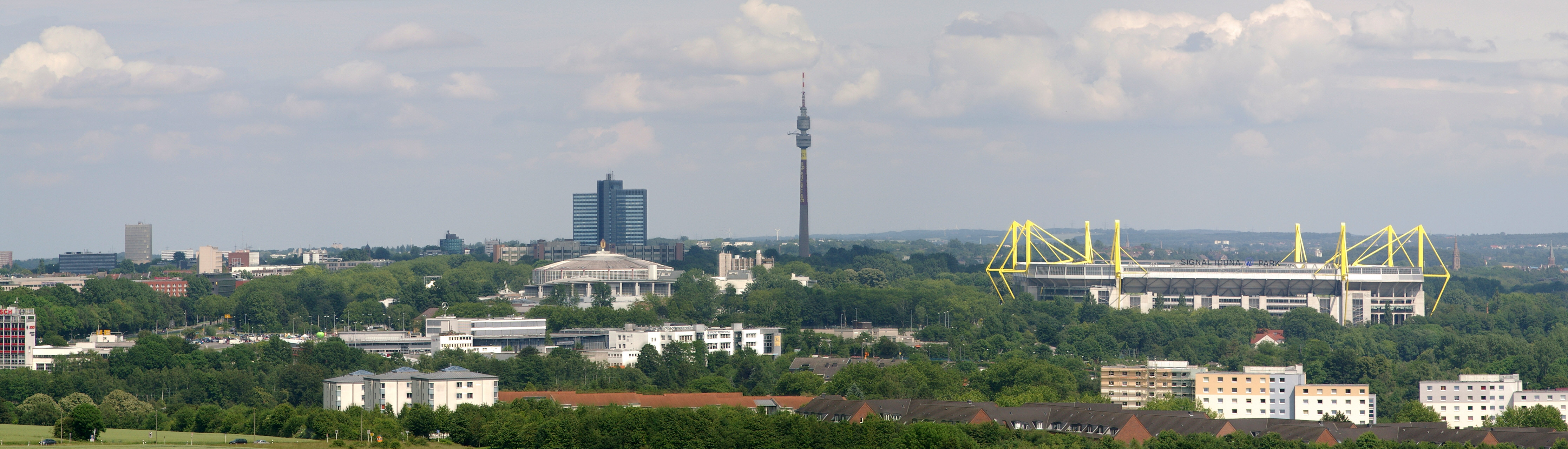 Blick auf Dortmund vom Mathetower der Universität aus. Leider recht diesig